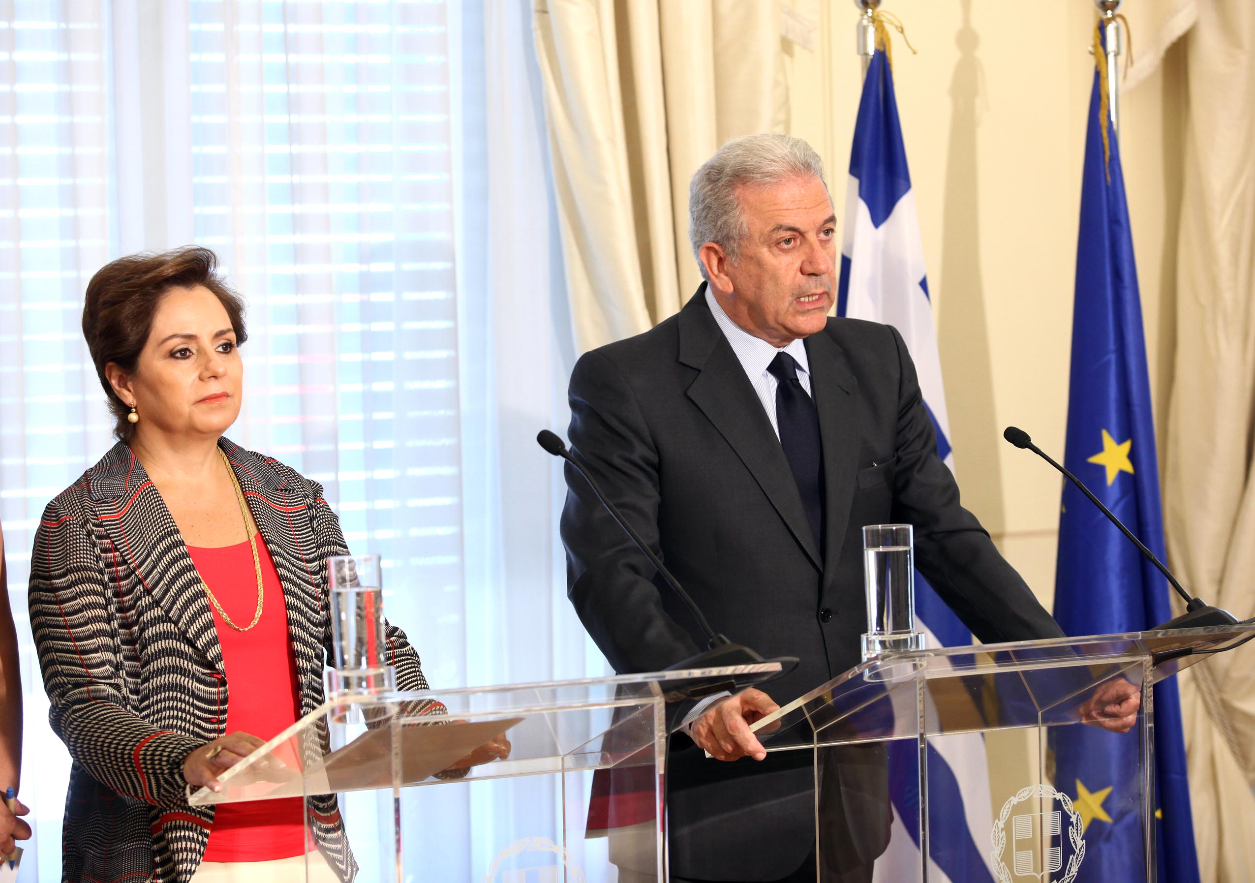 Την Παρασκευή 13 Ιουλίου 2012, o Υπουργός Εξωτερικών Δημήτρης Αβραμόπουλος συναντήθηκε με την Υπουργό Εξωτερικών του Μεξικού Patricia Espinosa Candellano.